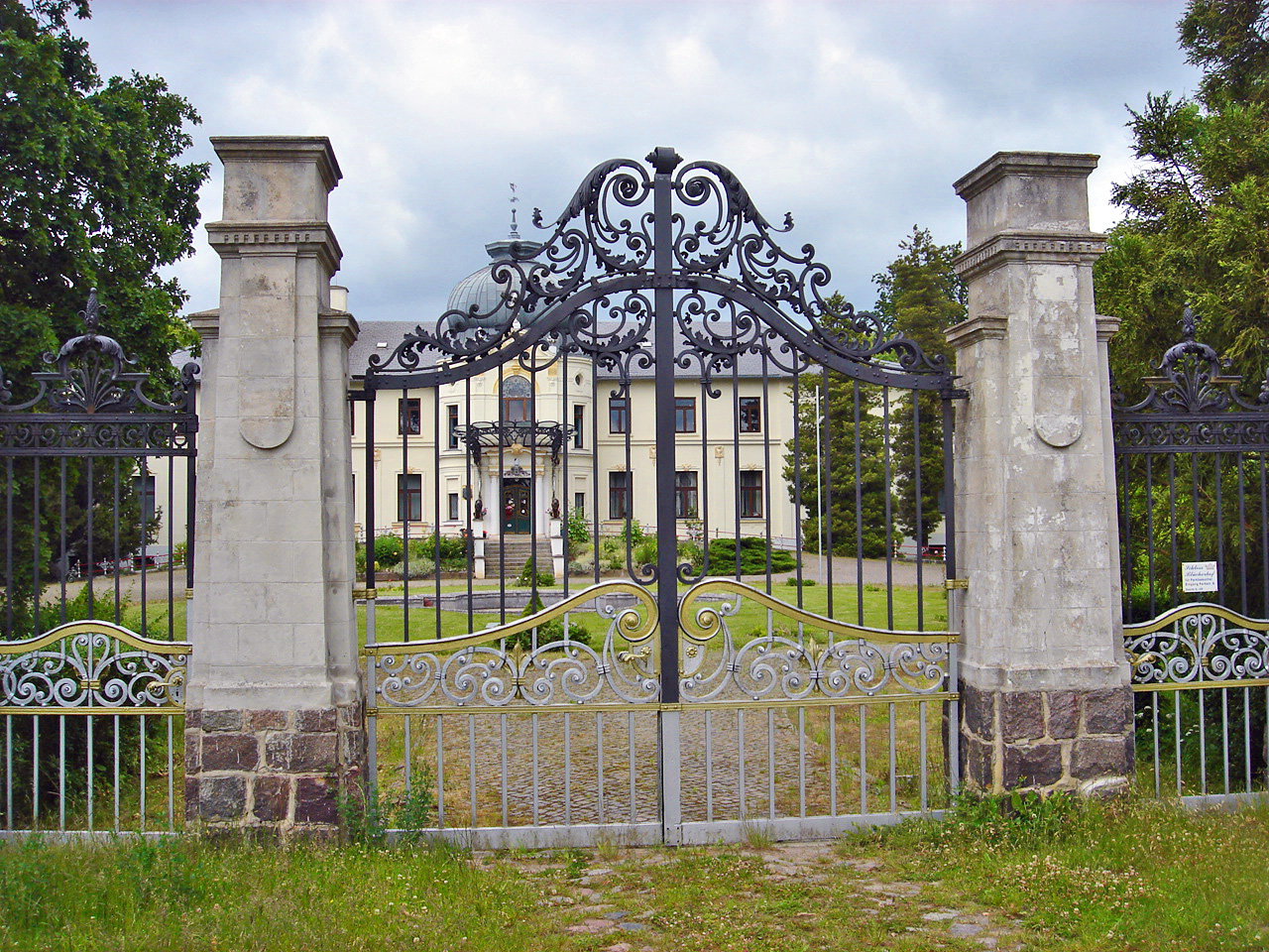 Schloss Blücherhof in Klocksin, Landkreis Müritz, Mecklenburg-Vorpommern. Erbaut 1902 nach Plänen von Gustav Holland erbaut. Neobarockes Herrenhaus mit Jugendstileinflüssen. 1904 vom Bonner Zoologieprofessor Alexander Koenig gekauft und zu einem Mustergut ausgebaut. Der 8 ha große Park ist dendrologisch wertvoll, es finden sich zahlreiche (auch exotische) Baumarten. Die prunkvollen Rokokotore zum öffentlich zugänglichen Park wurden 1908 geschmiedet. Das Herrenhaus selbst ist in Privatbesitz. Auf dem Gutshof finden sich Ferienwohnungen und ein Café.